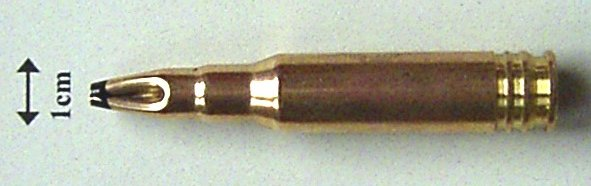 Übungsmunition der deutschen Bundeswehr, Aufschrift 7.62x51 MEN-79-9 zur Verwendung mit dem Manöverpatronengerät im MG3. Die Messingübungsmunition wird aus Kostengründen in der Regel nicht für das G3 ausgegeben, sondern nur für das MG3. Dort sind die Kunststoff Manöverpatronen nicht verwendbar, weil sie sich durch die größere thermische und meachanische Belastung zu stark verformen.